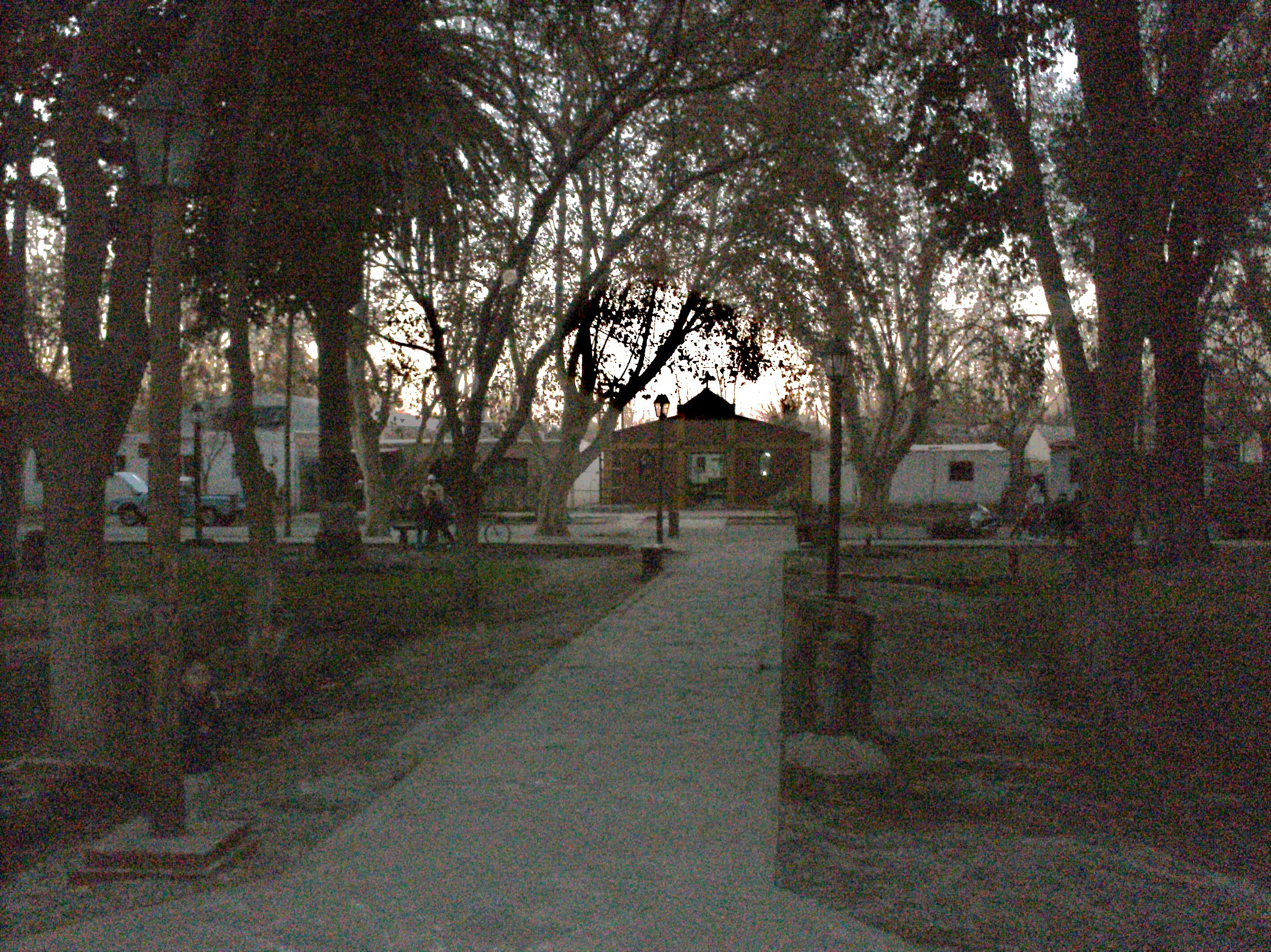 la plaza principal de la localidad